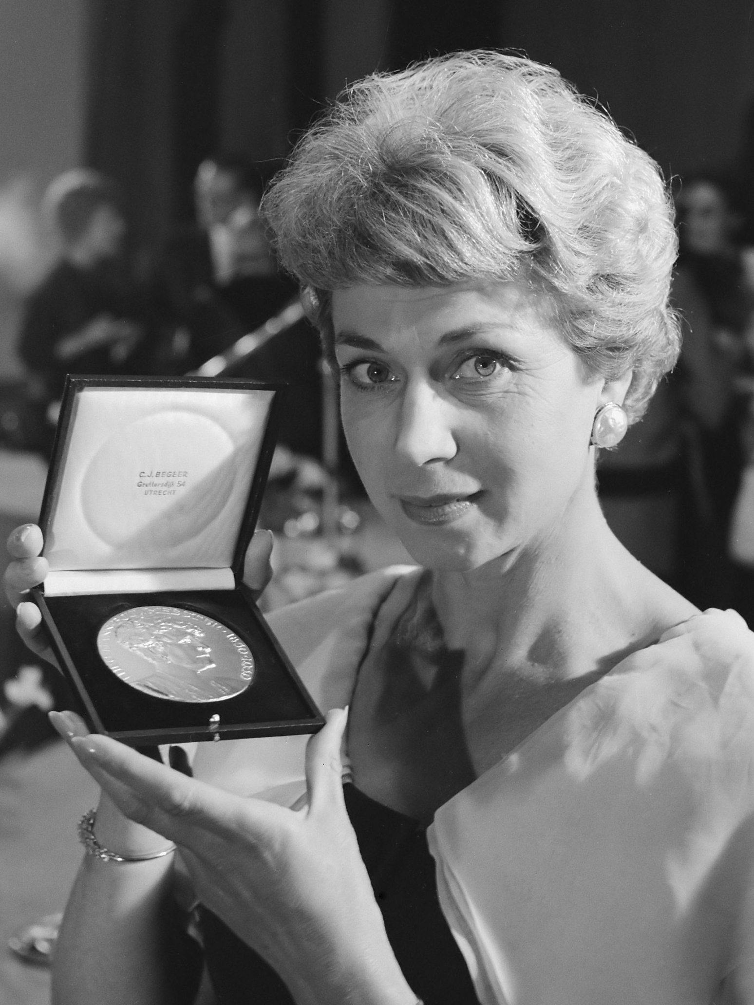 Theo d'Or Bouwmeesterpenning voor Anny de Lange 4 juni 1962